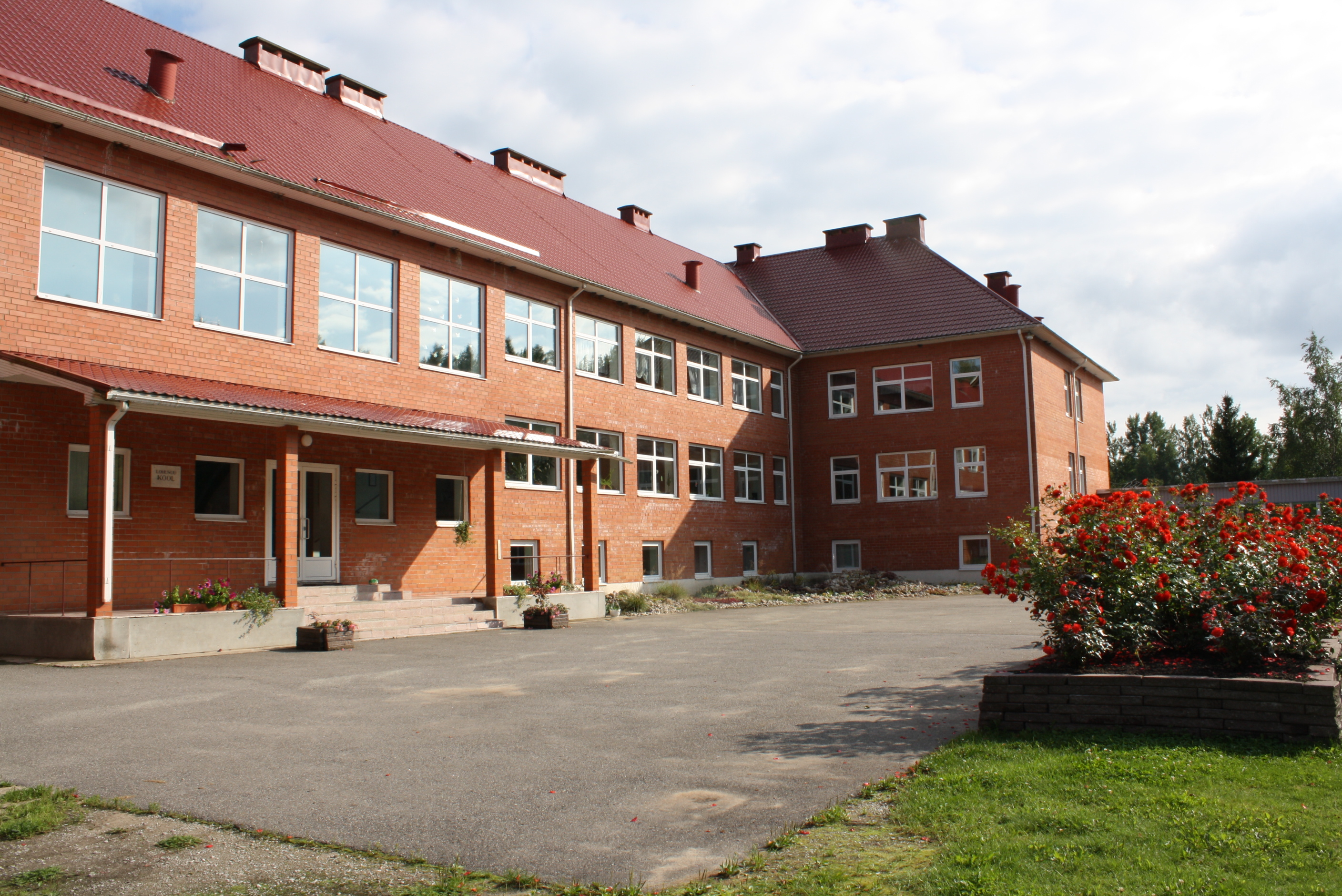 Lohusuu Kool